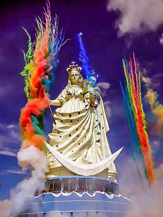 La monumental estatua de la Virgen del Socavón, de 45 metros de altura y 1.500 toneladas de peso. Oruro, Bolivia. This medium shows the protected monument with the number O/00-020 in Bolivia.